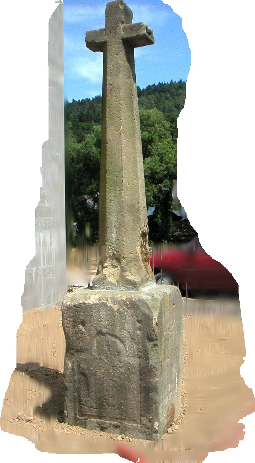 croix de grès jaune passerelle de Lavotte sur la rivière la Meurthe, en rive gauche, à Raon-l'Étape 88372